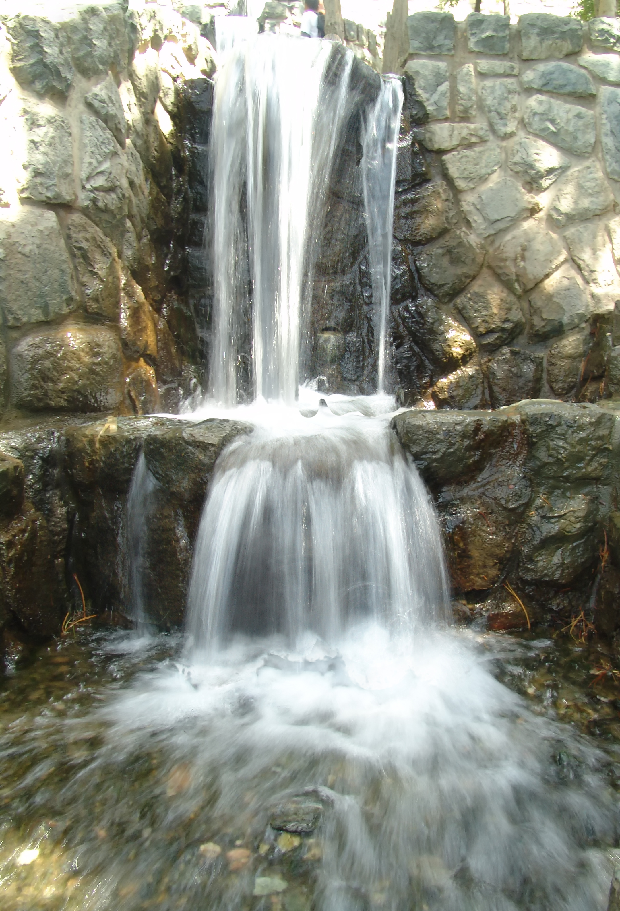 نوردهی درازمدت- پارک جمشیدیه